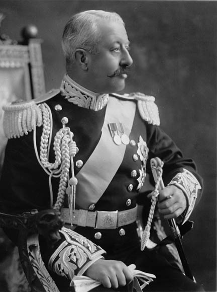 Victor Cavendish, 9e Duc de Devonshire dans son rôle de Gouverneur général du Canada